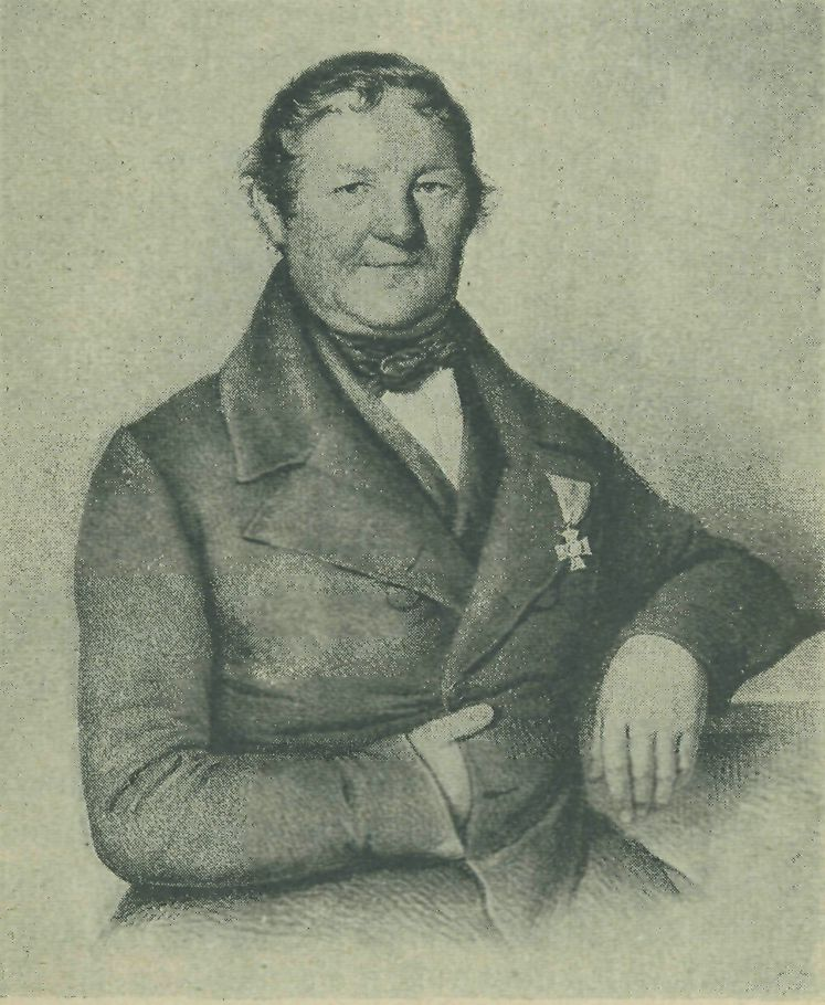 léčitel Antonín Pich, dobový portrét neznámého autora